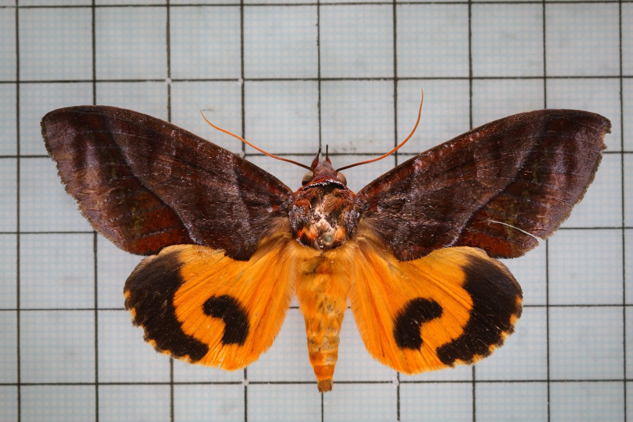 Othreis homaena Hubner male 鑲落葉夜蛾 鞍1:P.67,Pl.17-5